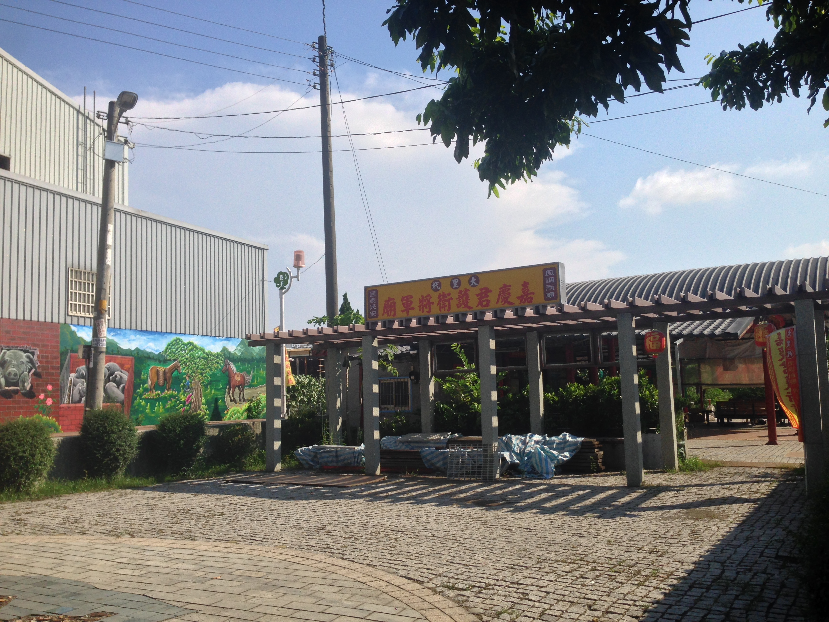 中文（台灣）: 嘉慶君護衛將軍廟外